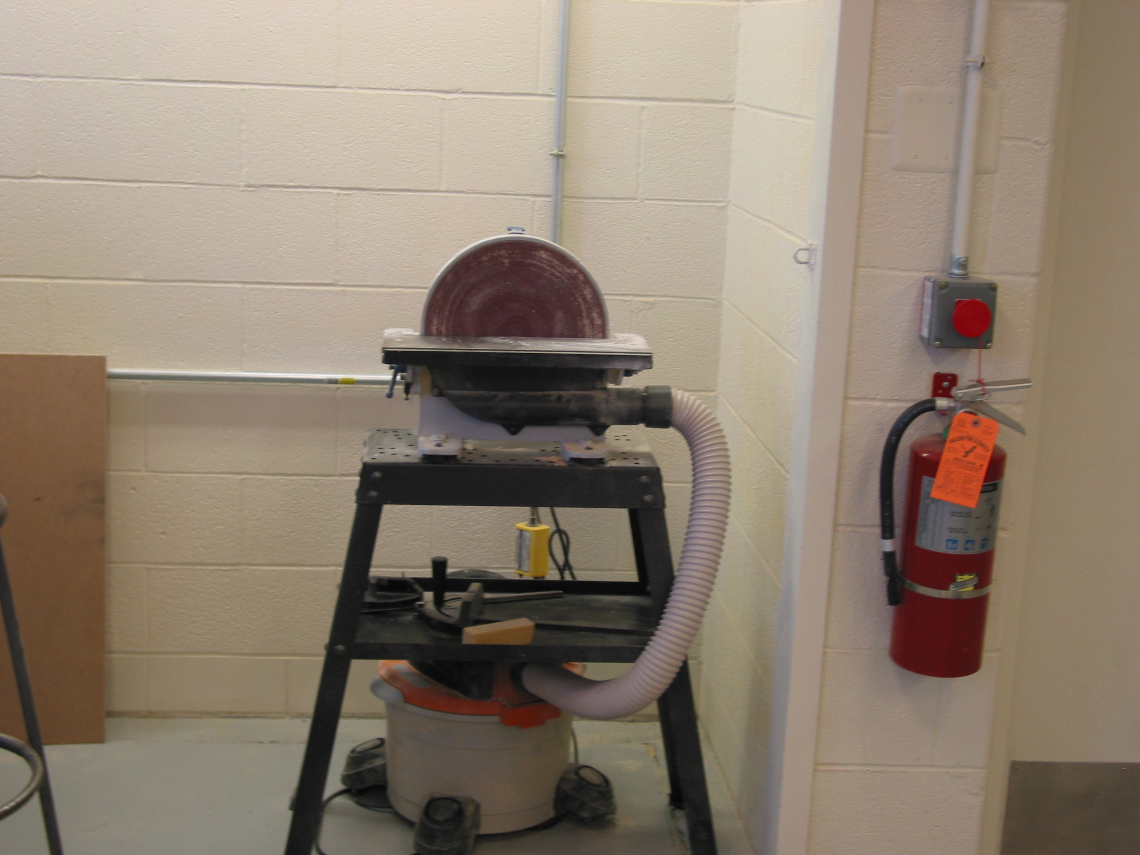 A disc sander